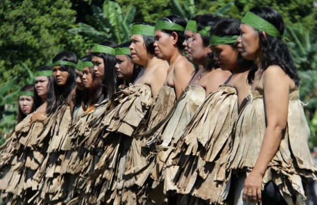 Wanita Sebagai Juru Damai Perang Antar Suku di Pulau Enggano Tari Perang adalah pagelaran kebudayaan yang mengisahkan pertempuran antar suku dalam memperebutkan wilayah kekuasaan, dimana peran para wanita sangat penting dalam perdamaian pertikaian antar suku. Sebuah pertunjukan kebudayaan tradisional seusai upacara HUT RI di Desa Apoho, Pulau Enggano, Bengkulu Utara, Bengkulu, Rabu (17/8/2016). Para ibu-ibu dan wanita membentuk barisan melingkar mengepung para pria yang sedang bertempur, hal inilah yang menyebabkan dan berakhir dengan sebuah perdamaian. Tarian perang ini diperankan oleh 100 pemuda-pemudi warga suku asli Enggano. [Rizky. T]